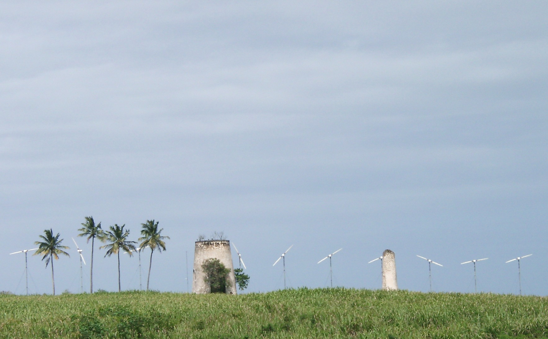 Marie-Galante appelée l'île aux cent moulins dispose maintenant d'éoliennes